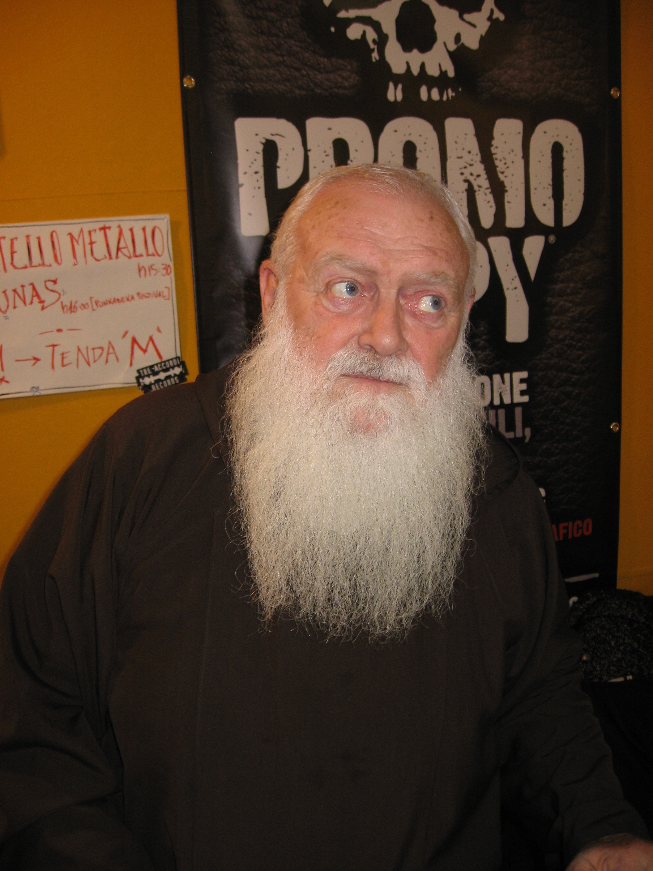 Foto di Frate Cesare Bonizzi (Frate Metal) presa al M.E.I. 2008